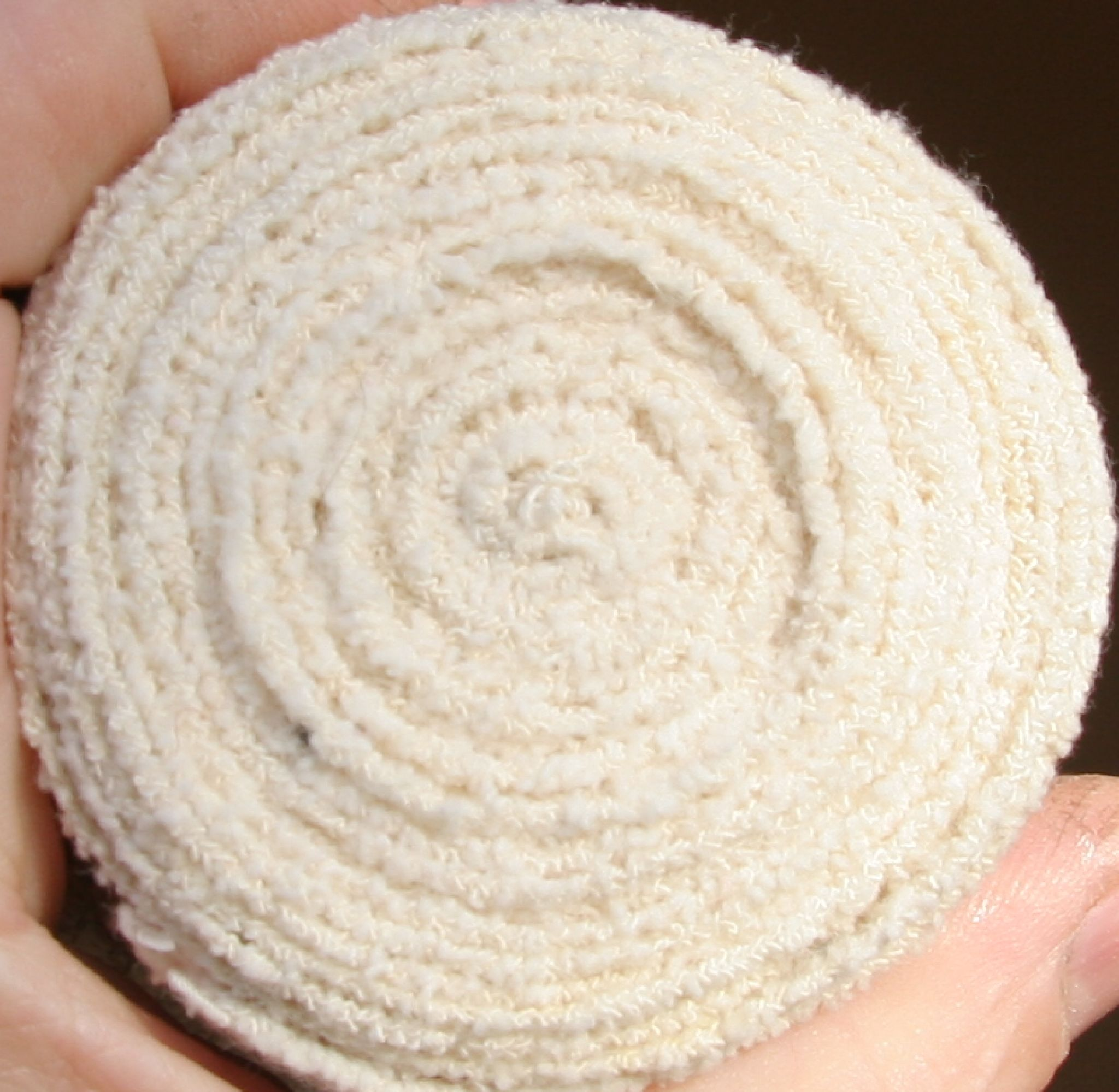 Bandage